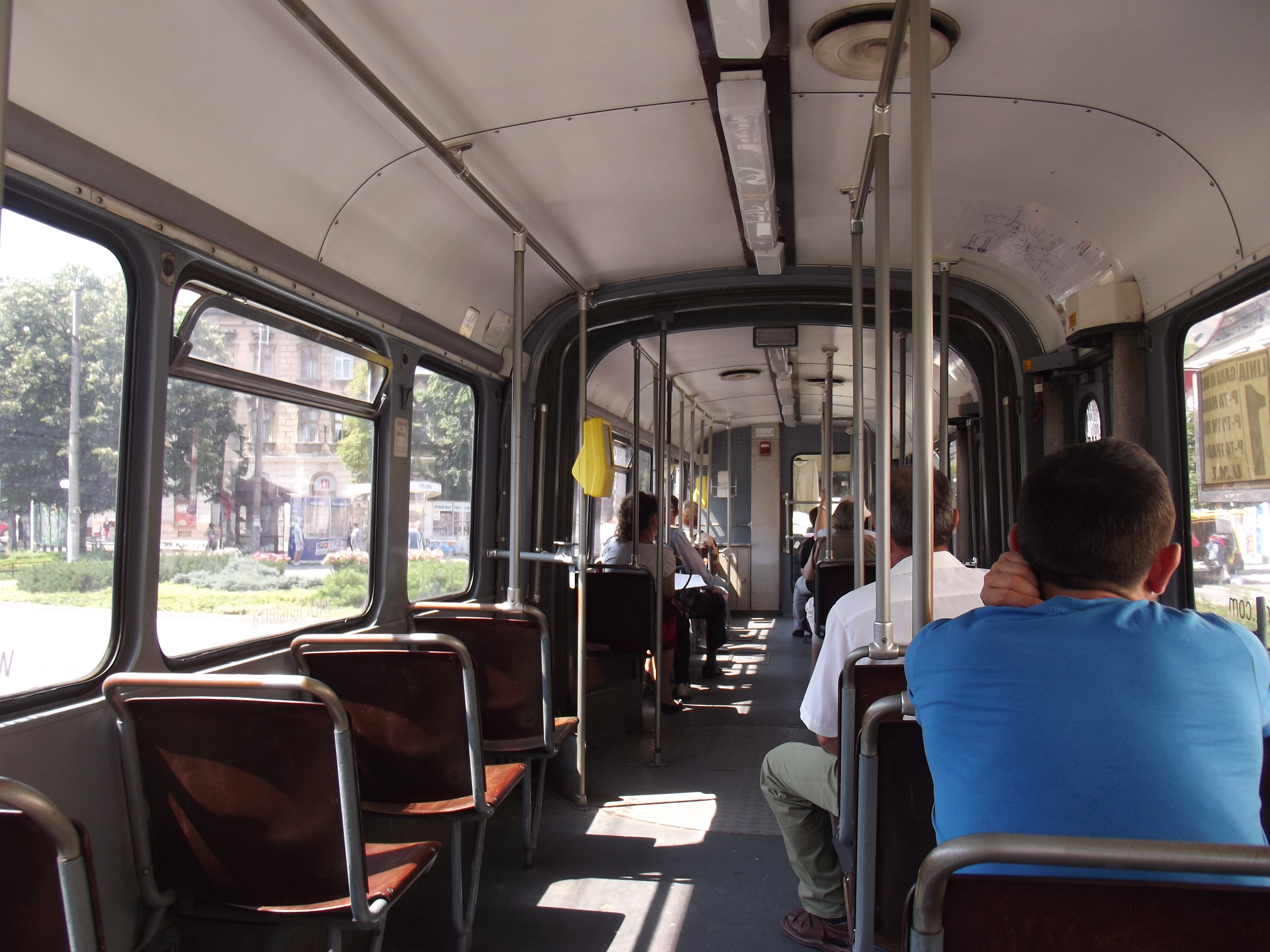 Tram interieur van ex Breemse trams in Timişoara